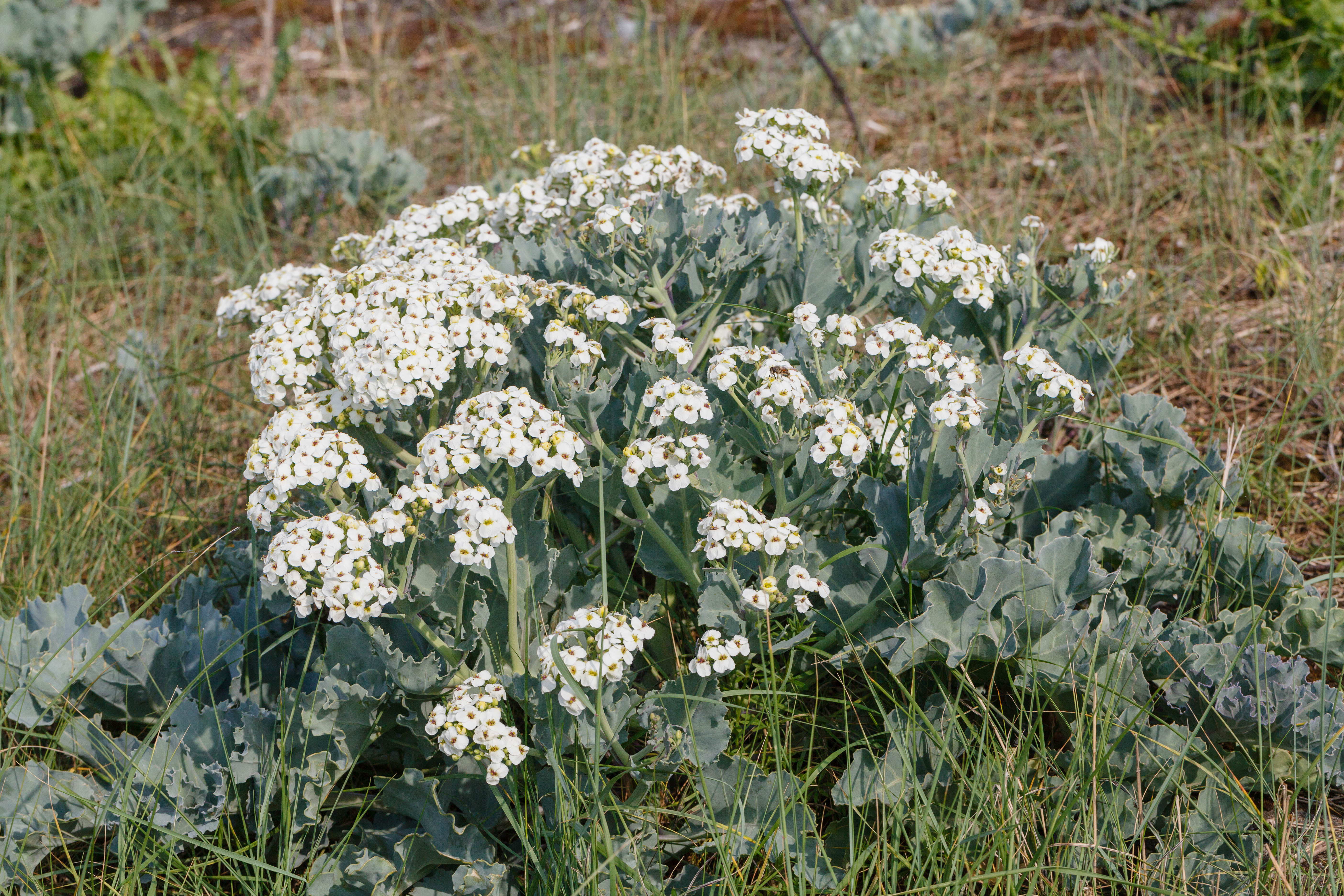 Zeekool, Crambe maritima